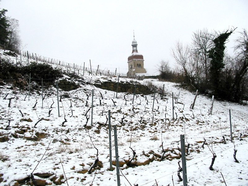 Vignoble Jurassien hivers